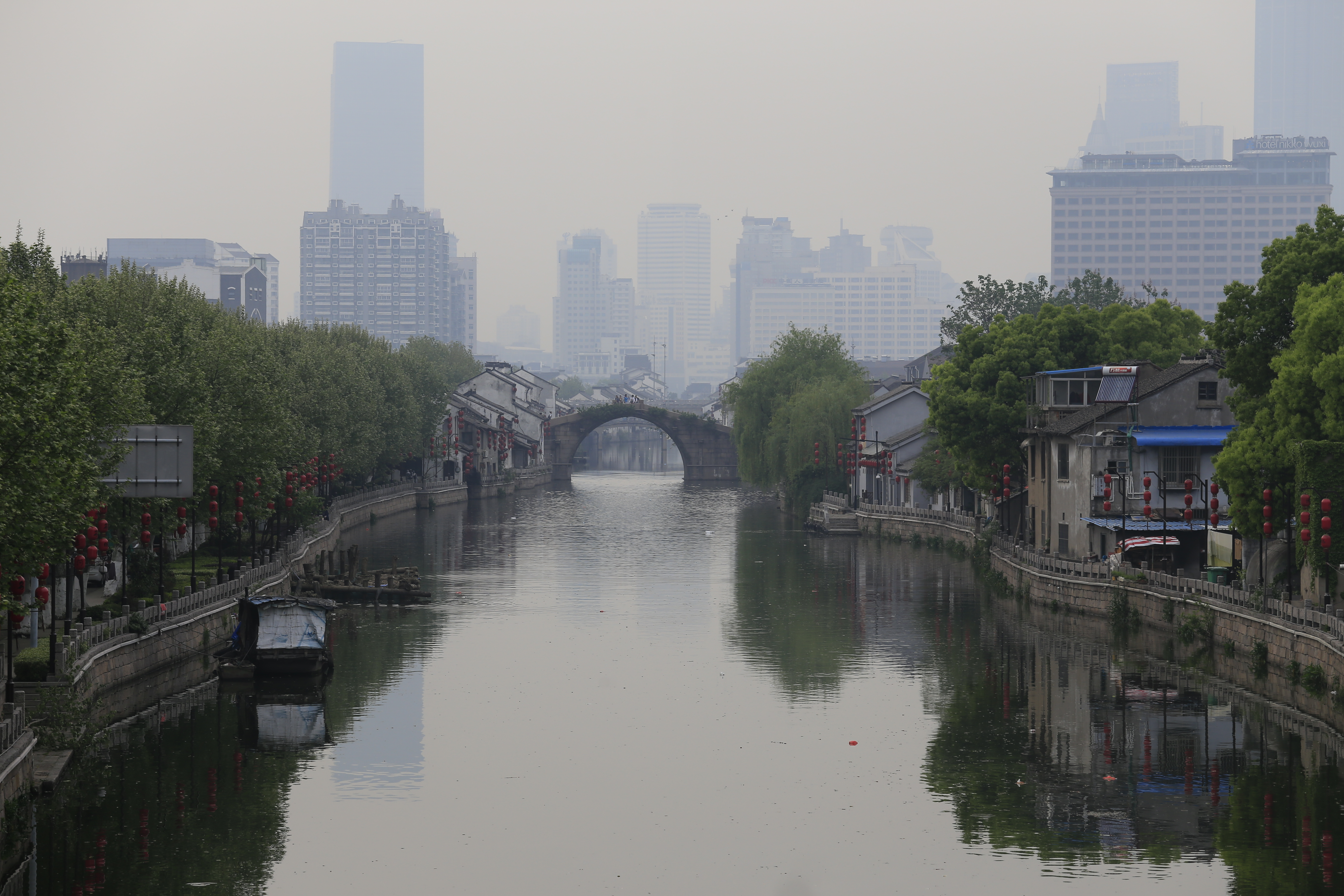 无锡市清名桥 南侧